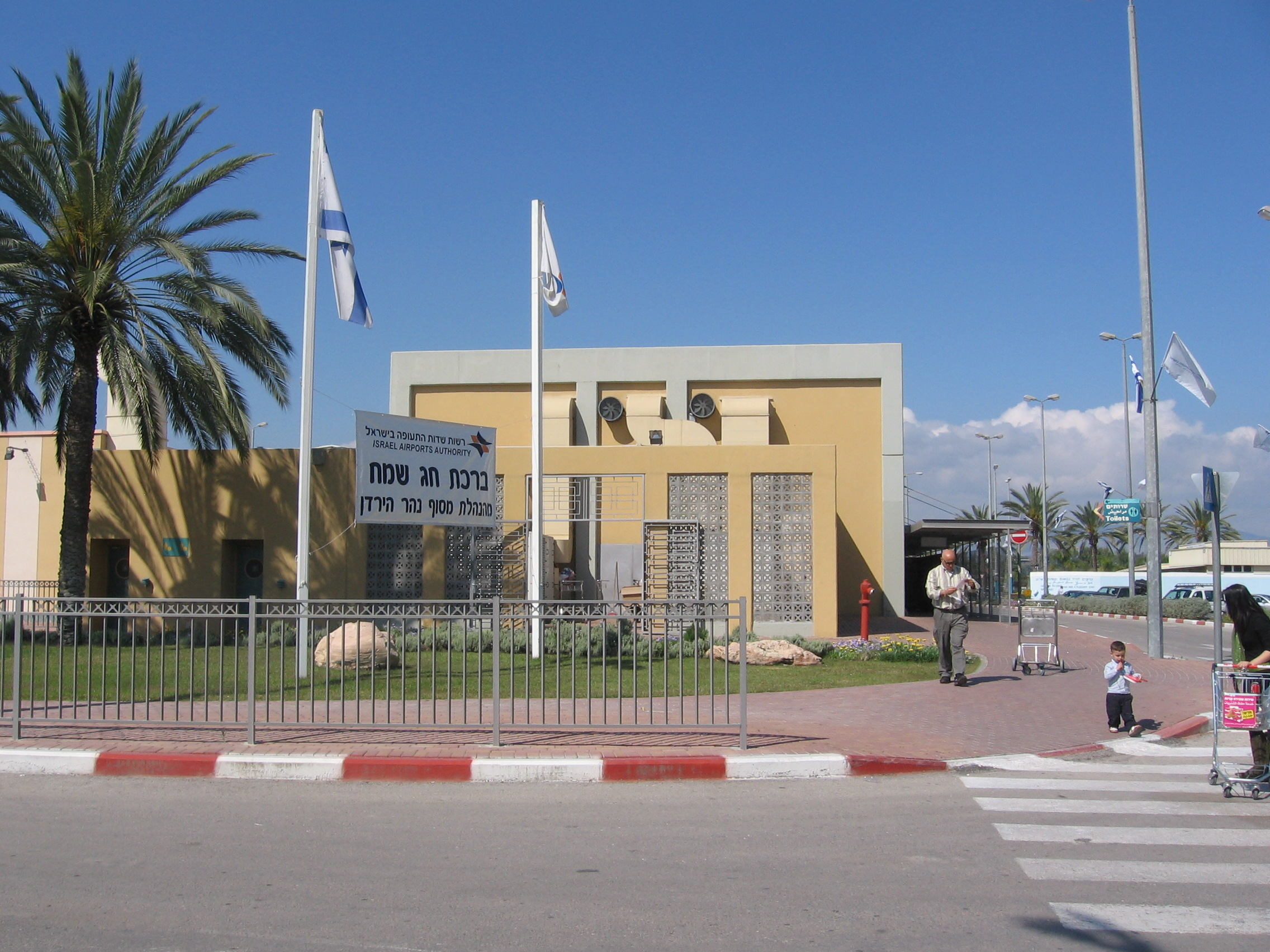 מעבר גבול נהר הירדן